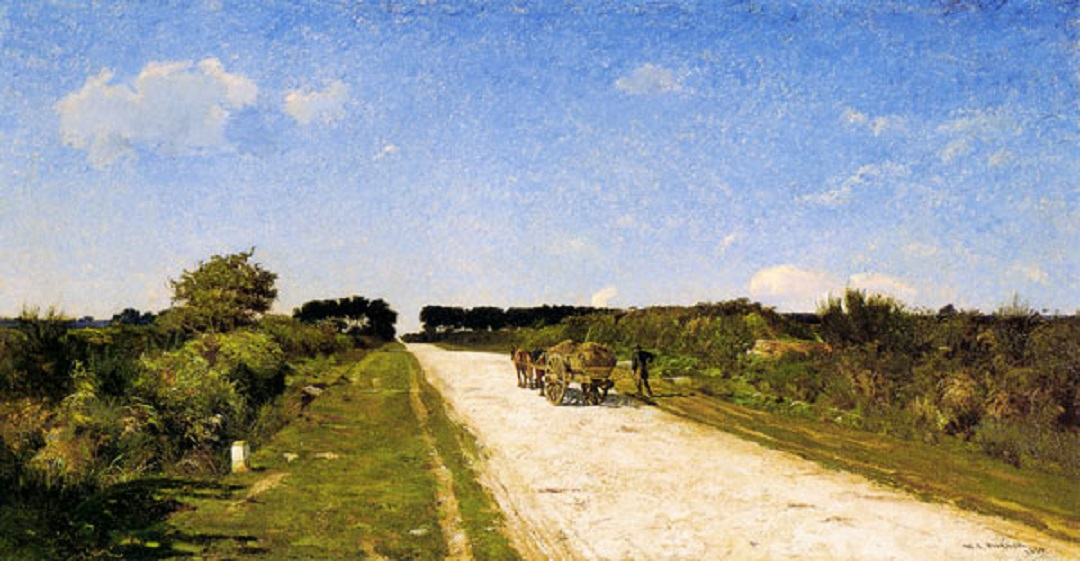 William Lamb Picknell : Le chemin de Concarneau (1880, huile sur toile)